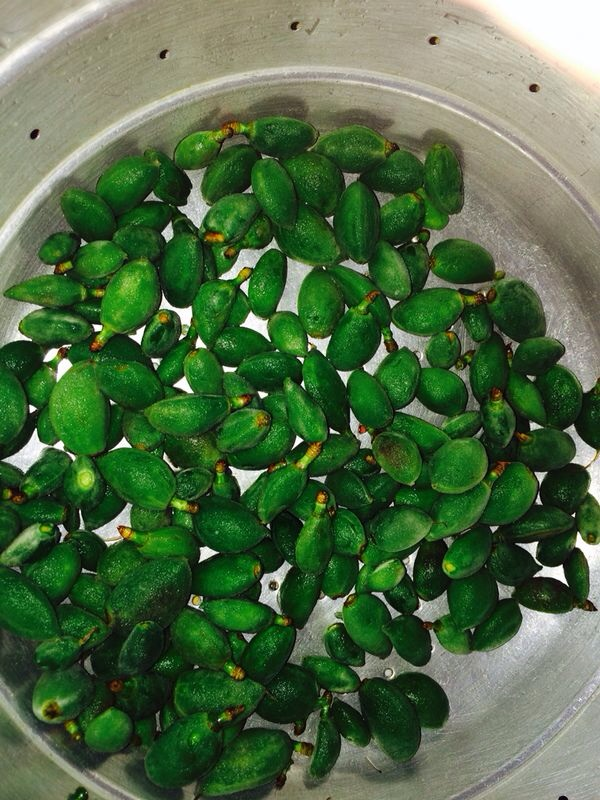 چغاله بادام شهرستان داريون-شيراز منطقه كشاورزي داريون